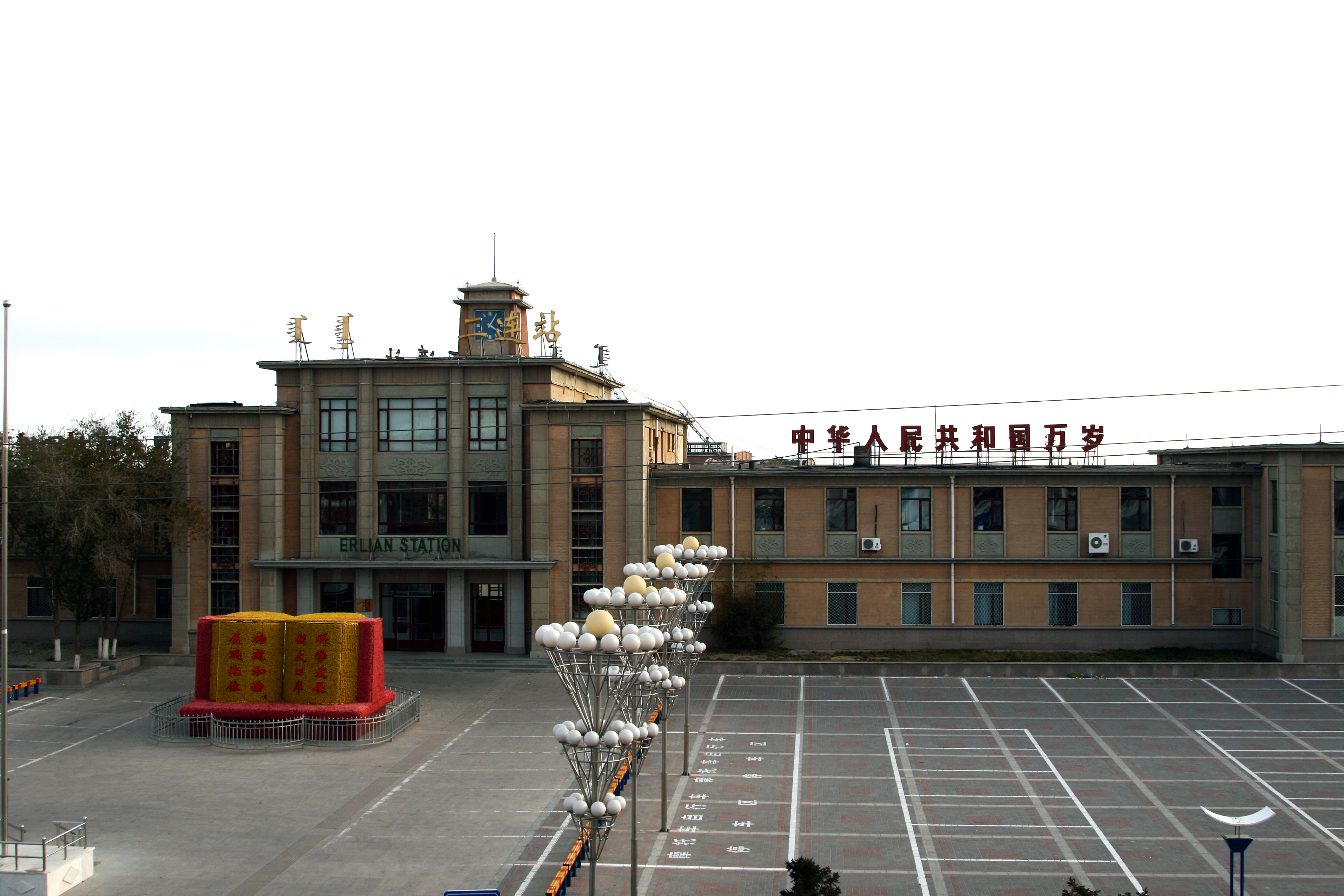 集二铁路二连站